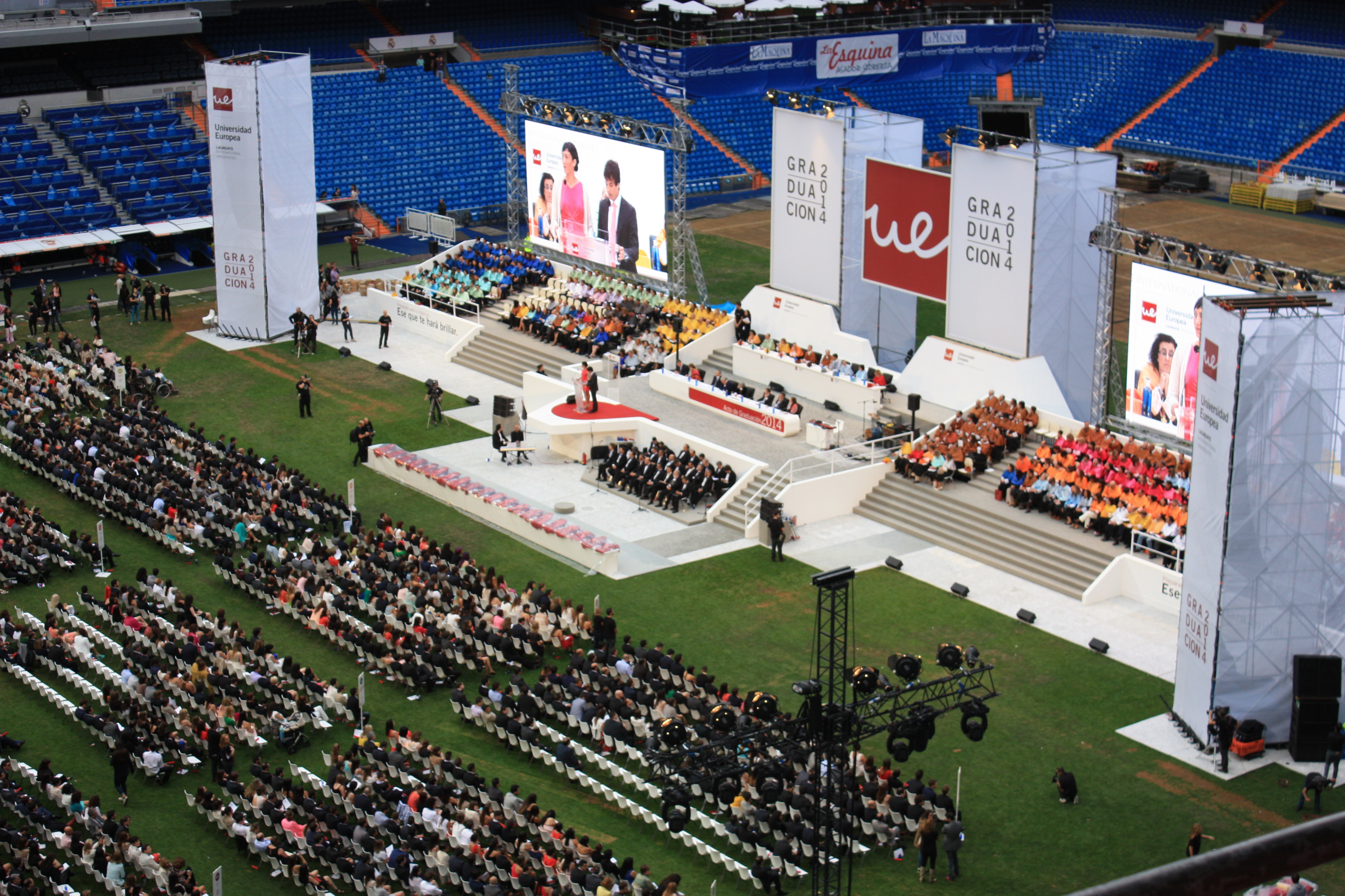 Ceremonia de Graduación de los graduados de todas las facultades celebrada el 3 de julio de 2014 en el Estadio Santiago Bernabéu